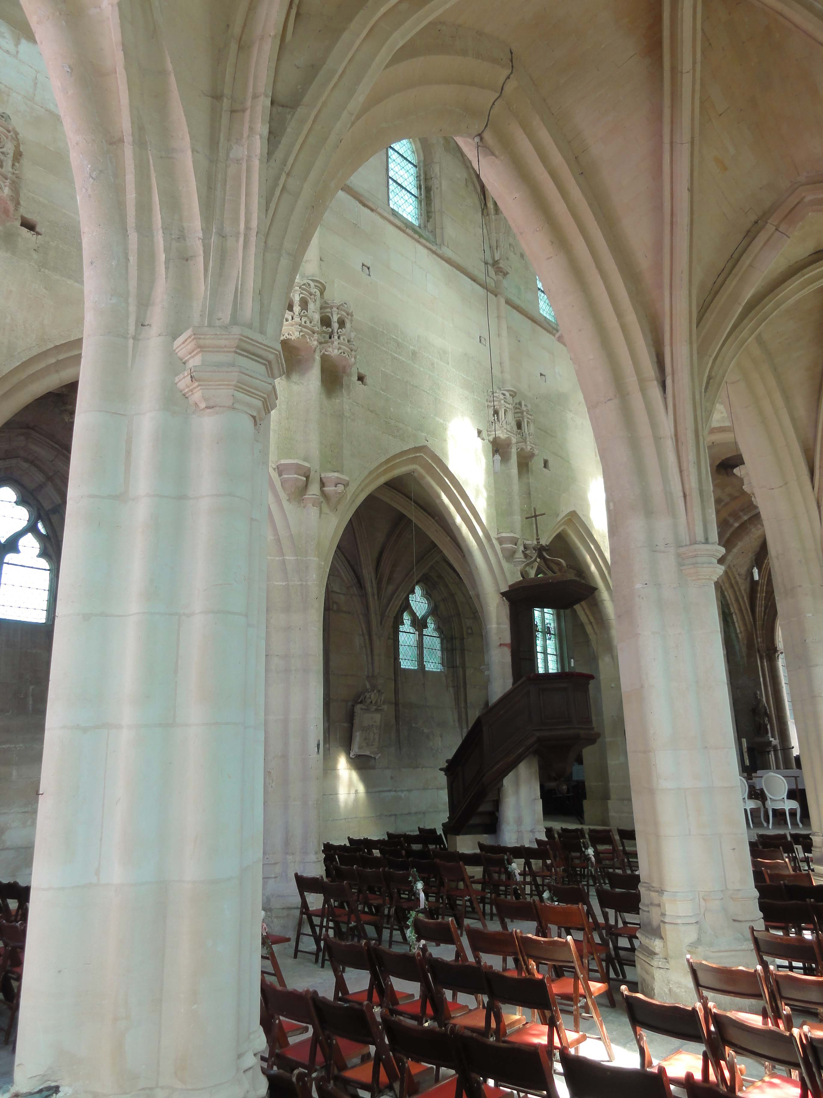 Intérieur de l'église - voir titre.